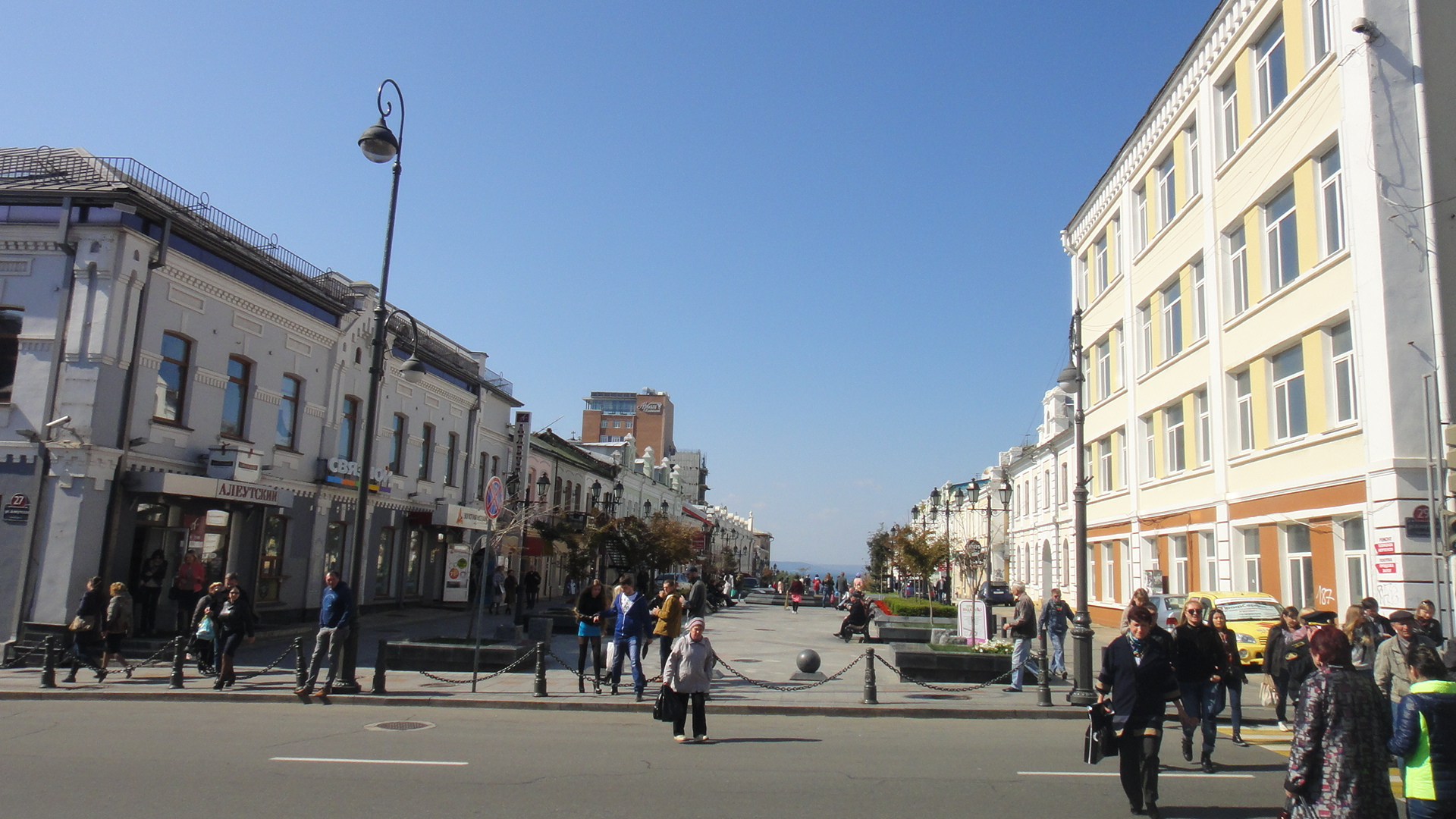 Улица Адмирала Фокина